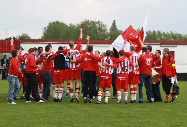 Overwinning na de verre verplaatsing zorgde voor een vurig feest in Opdorp en later ook in Oudenhove dorp.